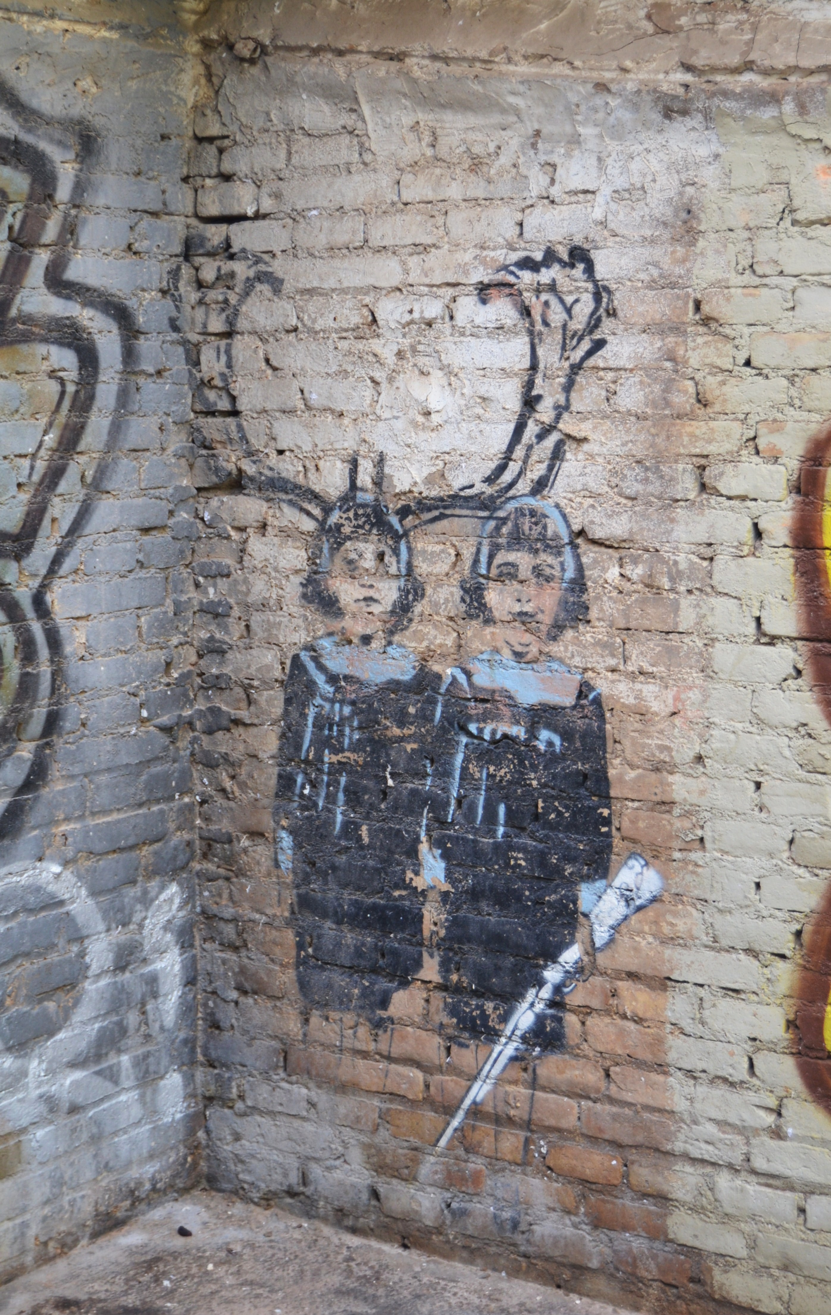 Graffiti de les bessones de Diane Arbus al Carme, València.